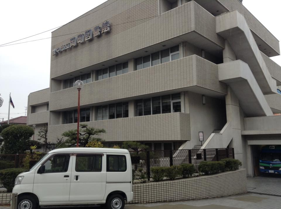 豊中市立岡町図書館 駅方面から見た外観です。BM車庫もあります。